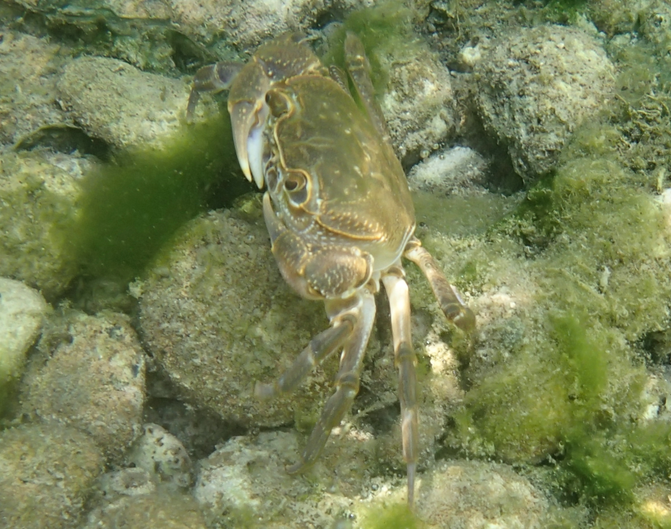 Granchio d'acqua dolce